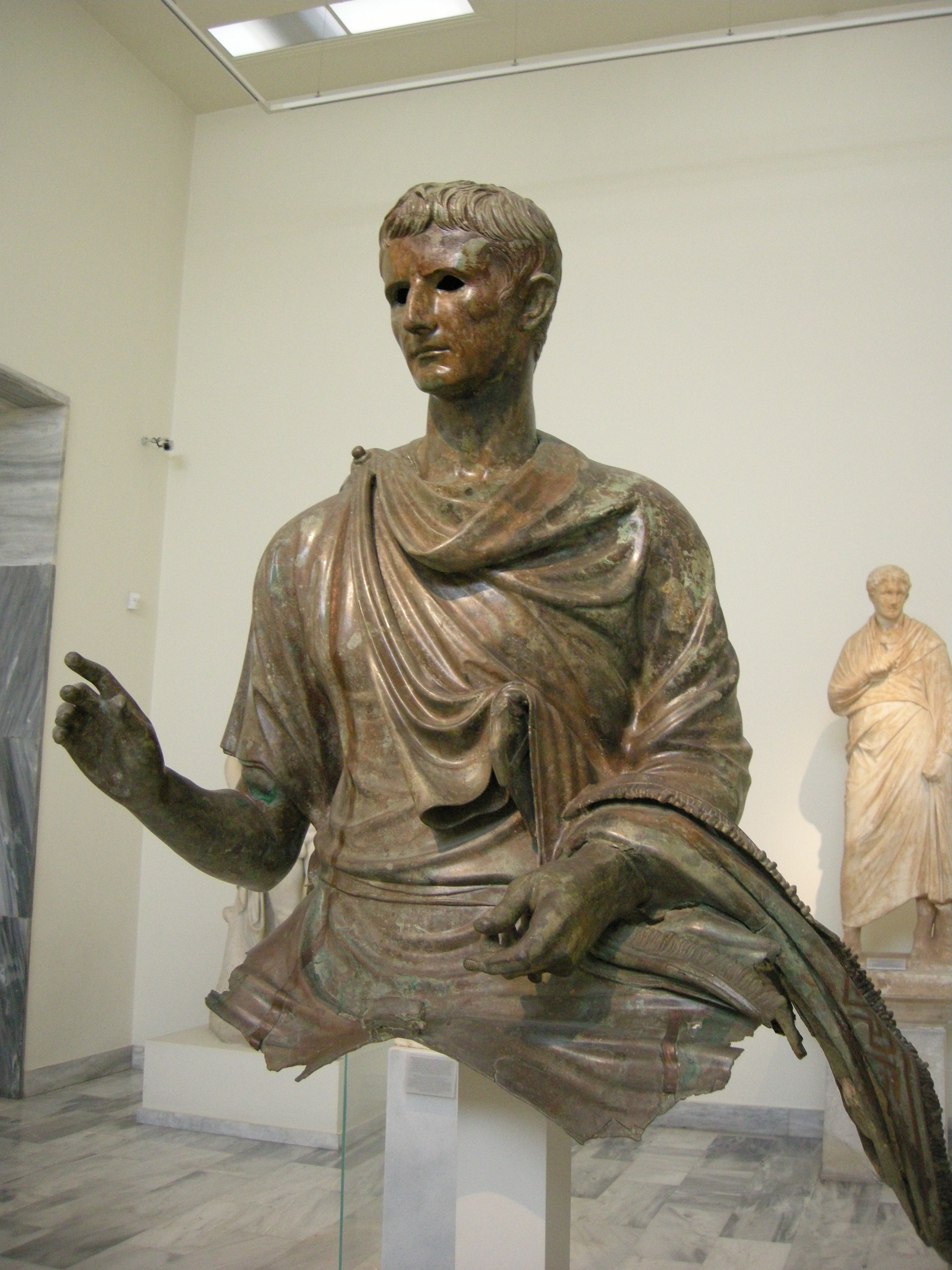 Nama ottaviano augusto